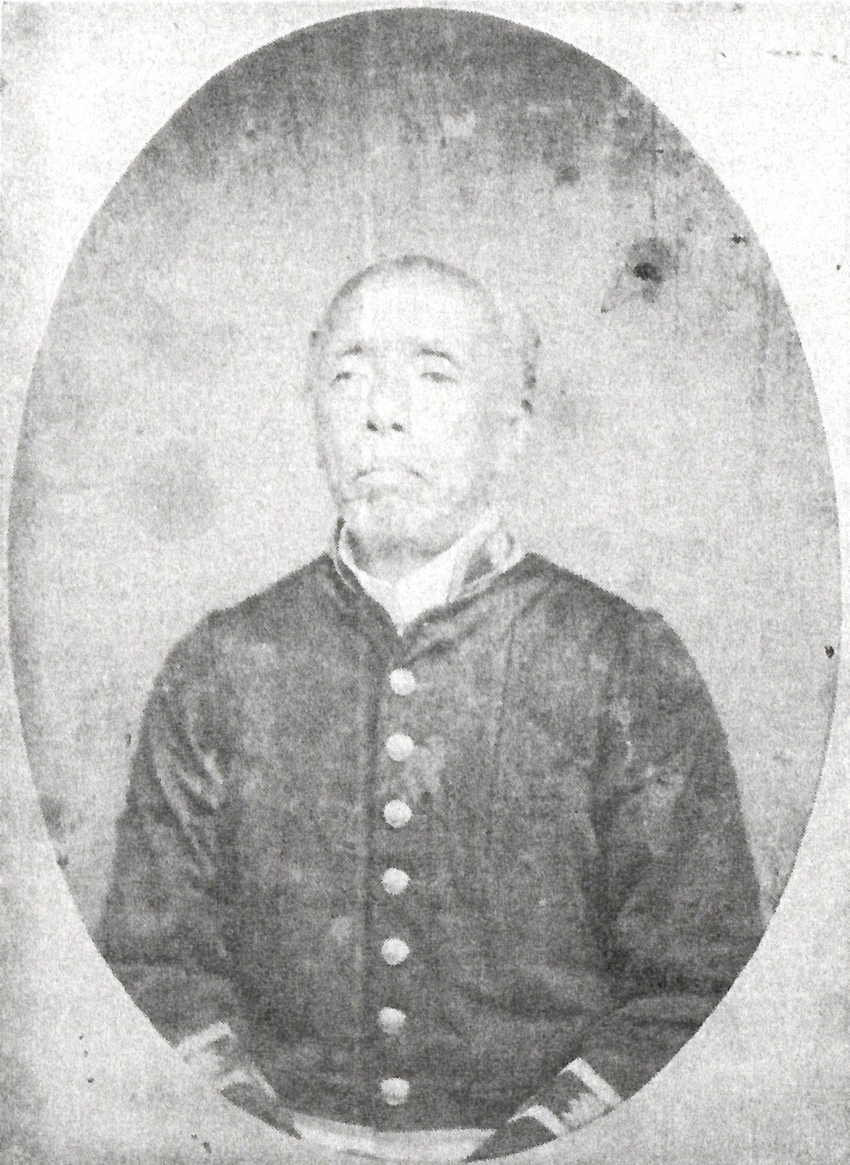 五島盛成の肖像写真。